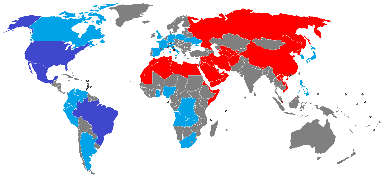 Présence des Témoins de Jéhovah dans le monde en 2017. En bleu : plus de 500,000 proclamateurs. Plus de 500,000 proclamateurs. Plus de 100,000 proclamateurs. pays où ils sont interdits